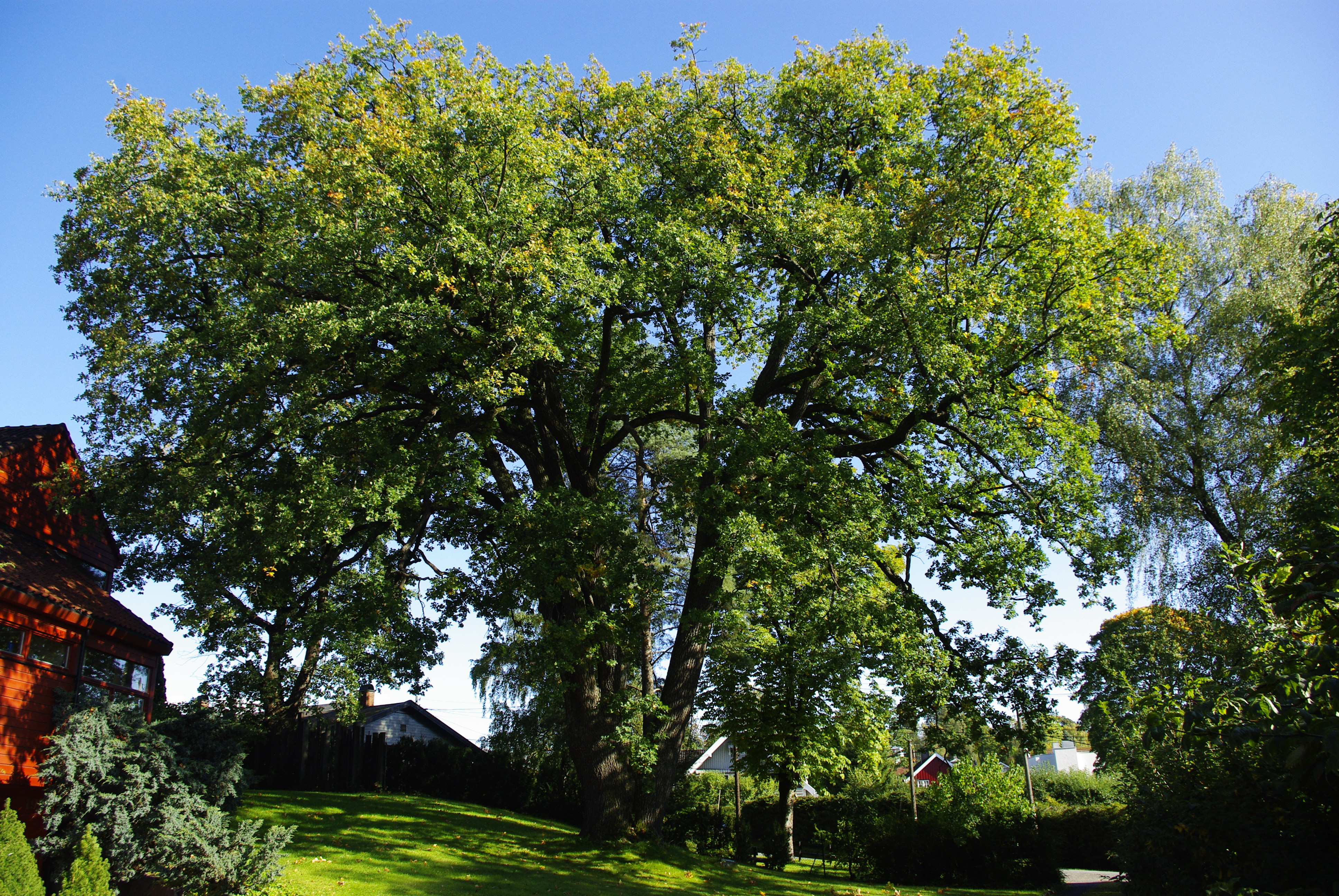 Treet og trekrona med fult bladverk, bildet er tatt i september 2011